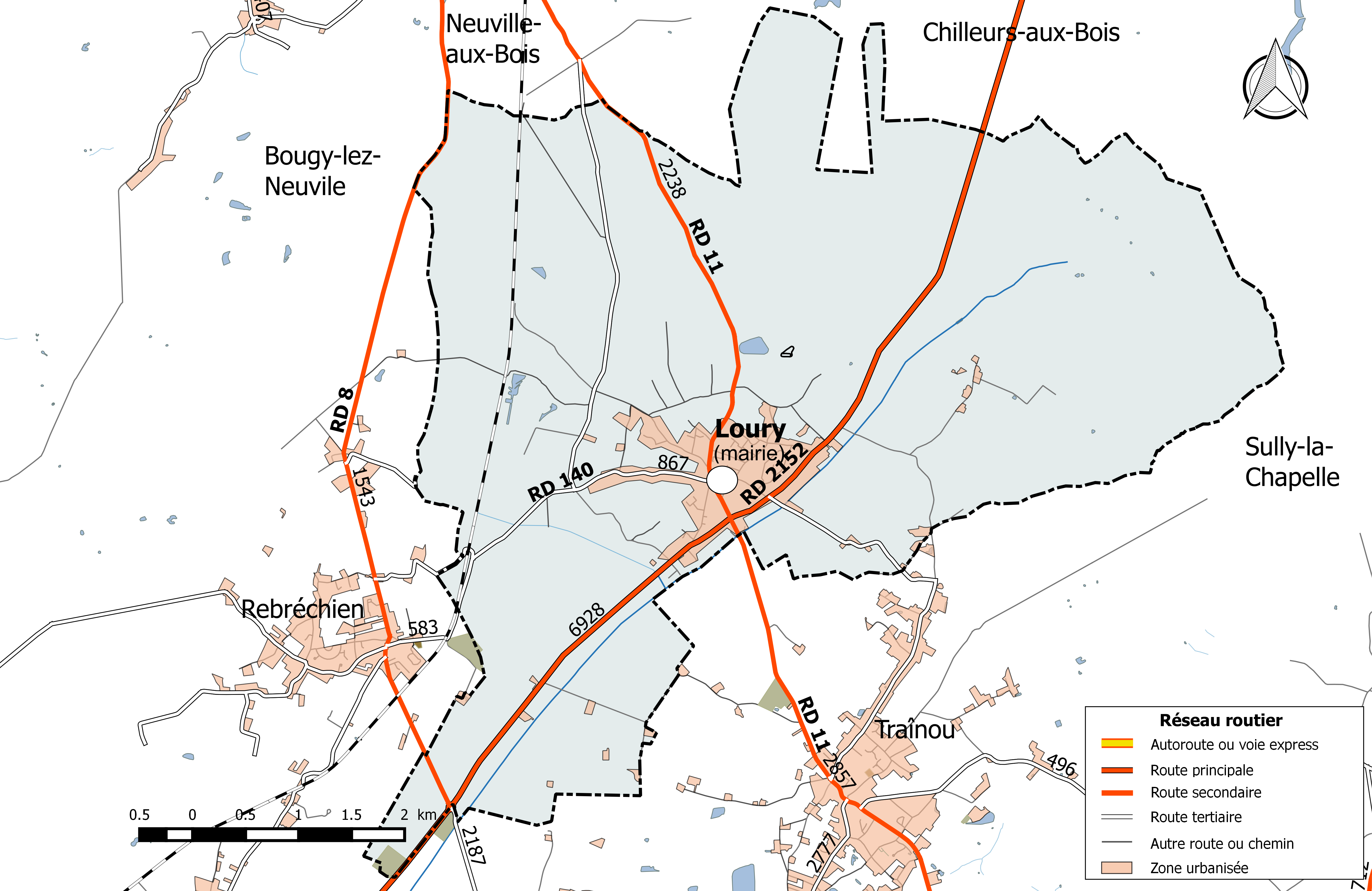 Carte du réseau routier de la commune de Loury.